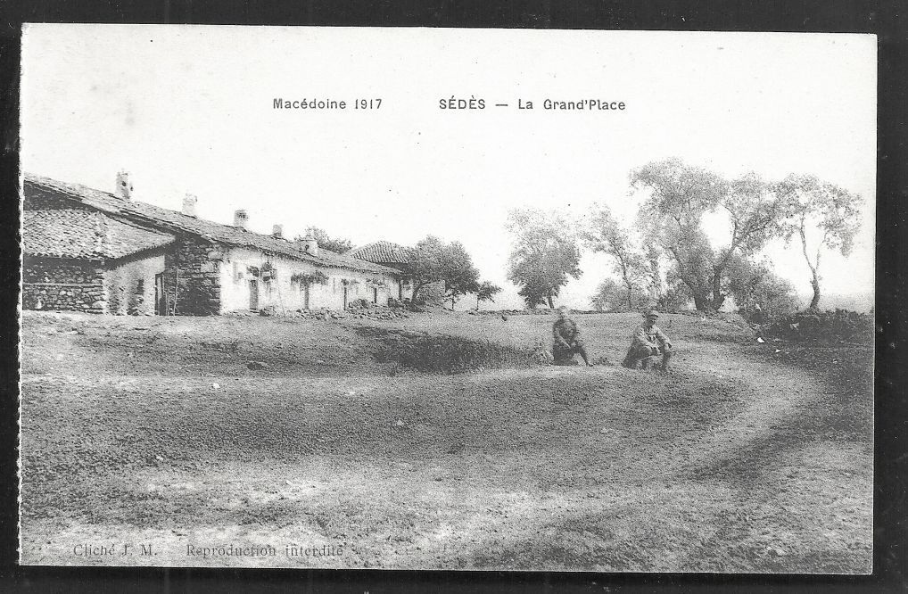 Седес през Първата световна война